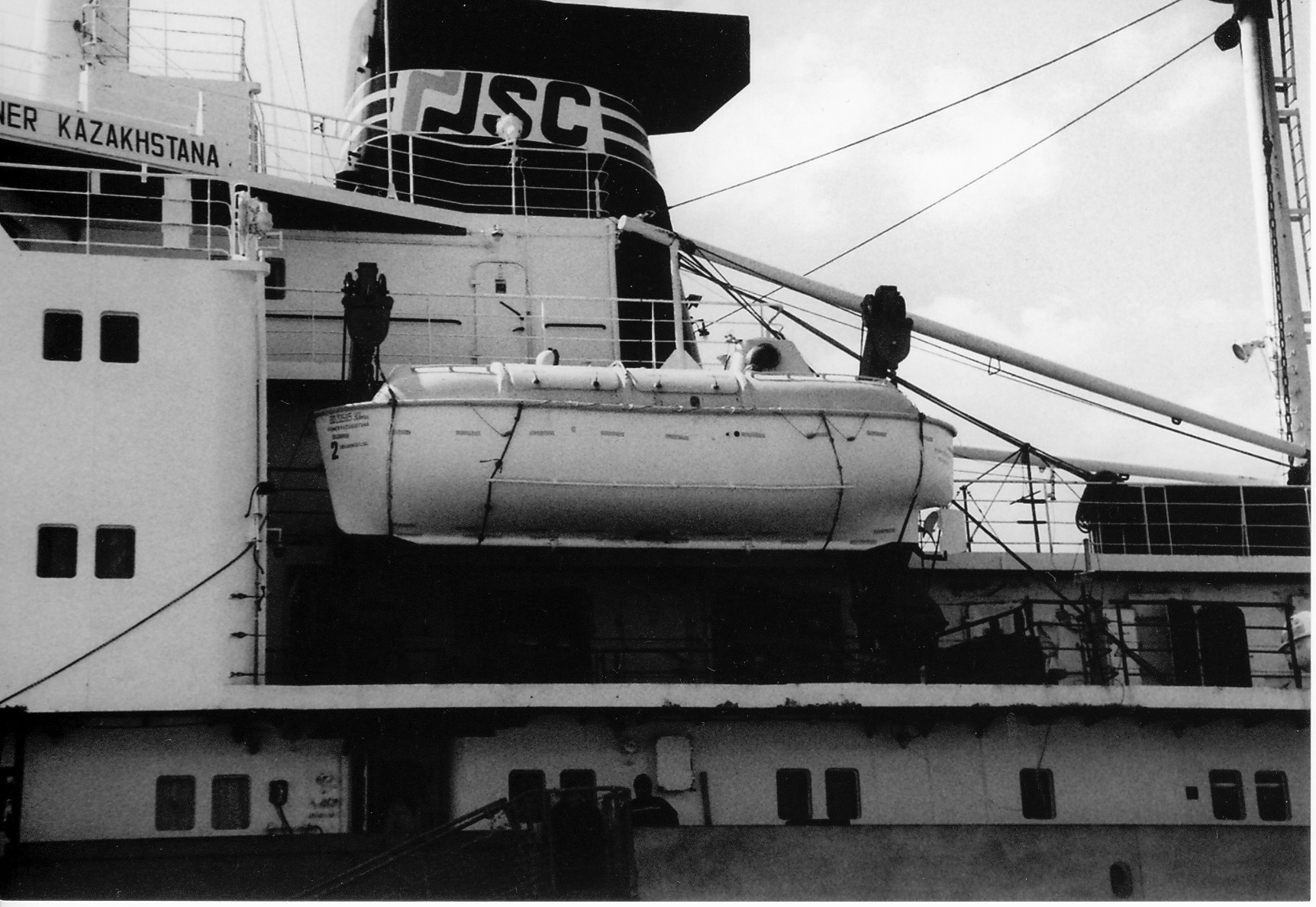 Kuhr-Rettungsboot am Frachter Pioner Kazakhstana der Murmansker Seereederei im Fischereihafen Bremerhaven